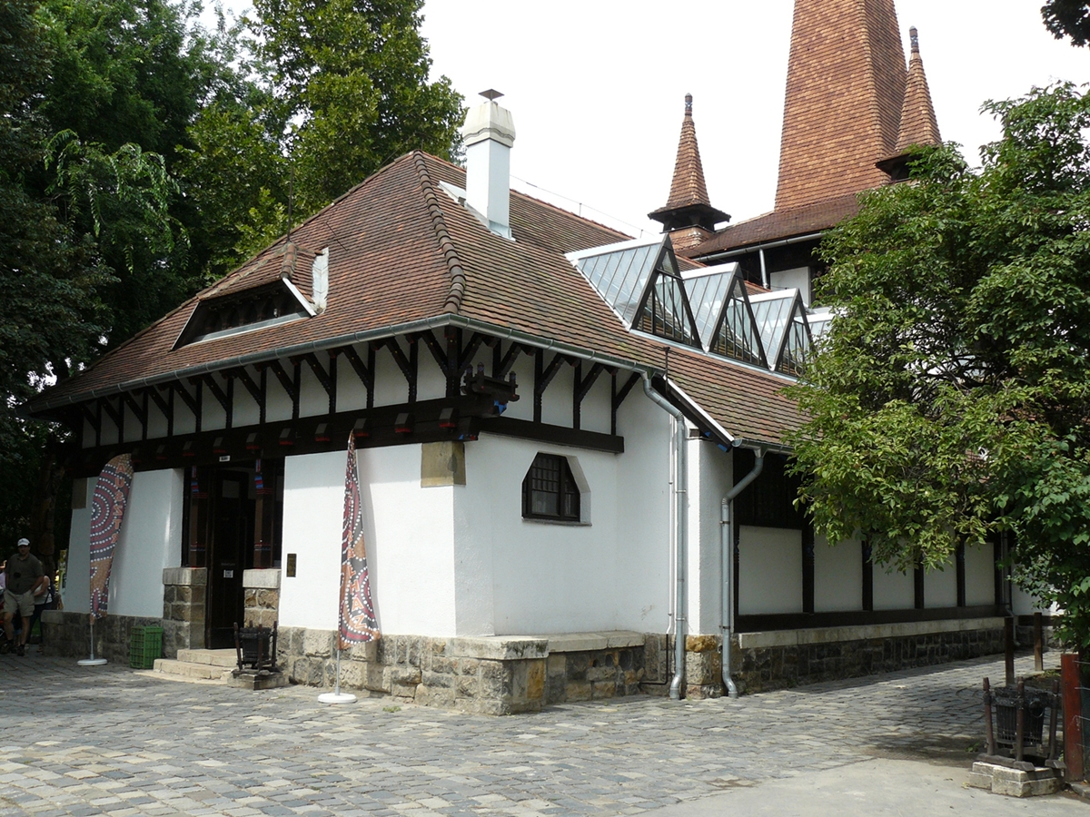 A 2010-ben átadott Ausztrál-ház a Fővárosi Állatkertben (Budapest)